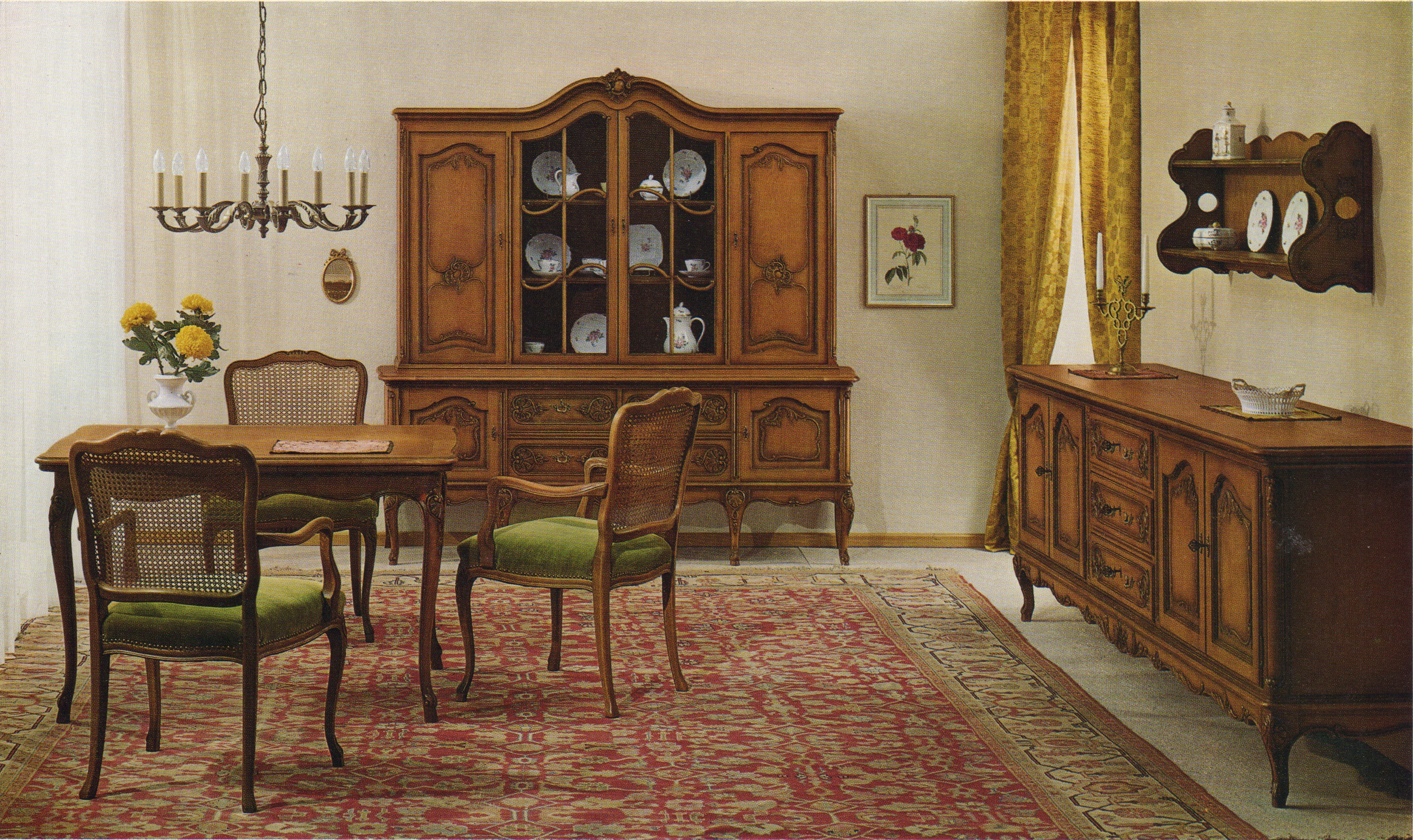 Katalogabbildung 1965, Speisezimmer Beispiel 152: Schrank „Aachen“, Sideboard „Eupen“, Wandboard „Utrecht“, Esstisch „Moers“, Armlehnstühle „Wien“ in Aachen-Lütticher Barock